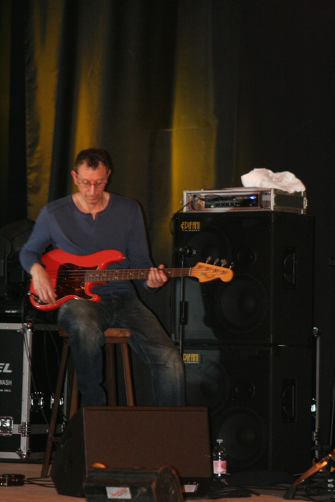 Amarone in Jazz Day 2 Amarone in Jazz, San Pietro in Cariano 12-14 Settembre 2008